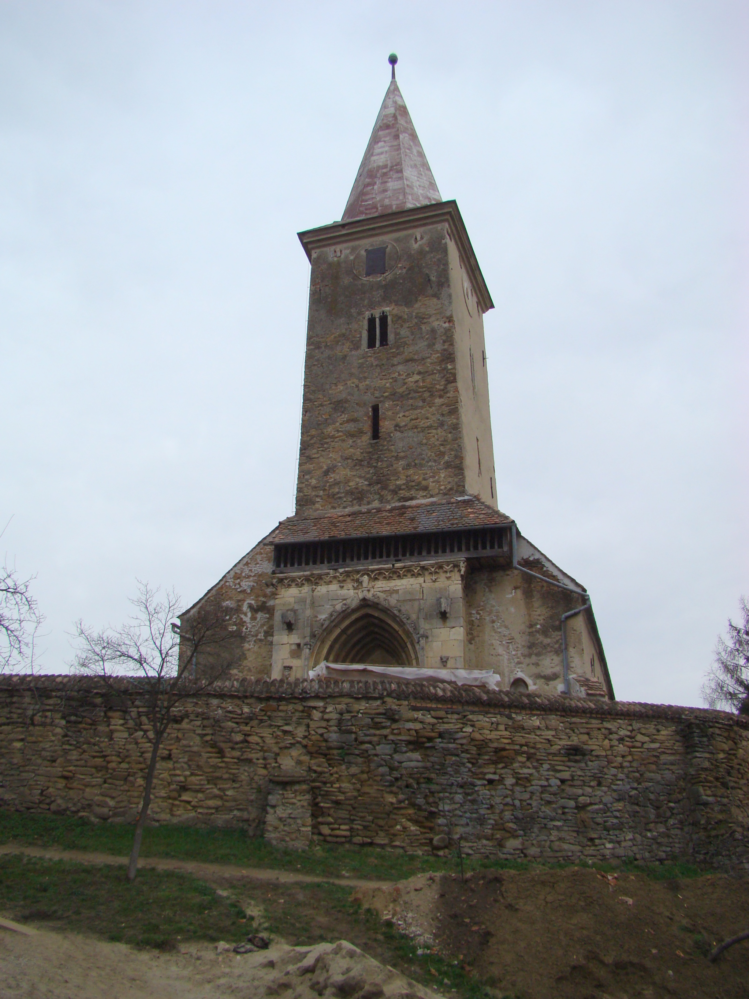 Ansamblul bisericii evanghelice fortificate, sat CURCIU; comuna DÂRLOS